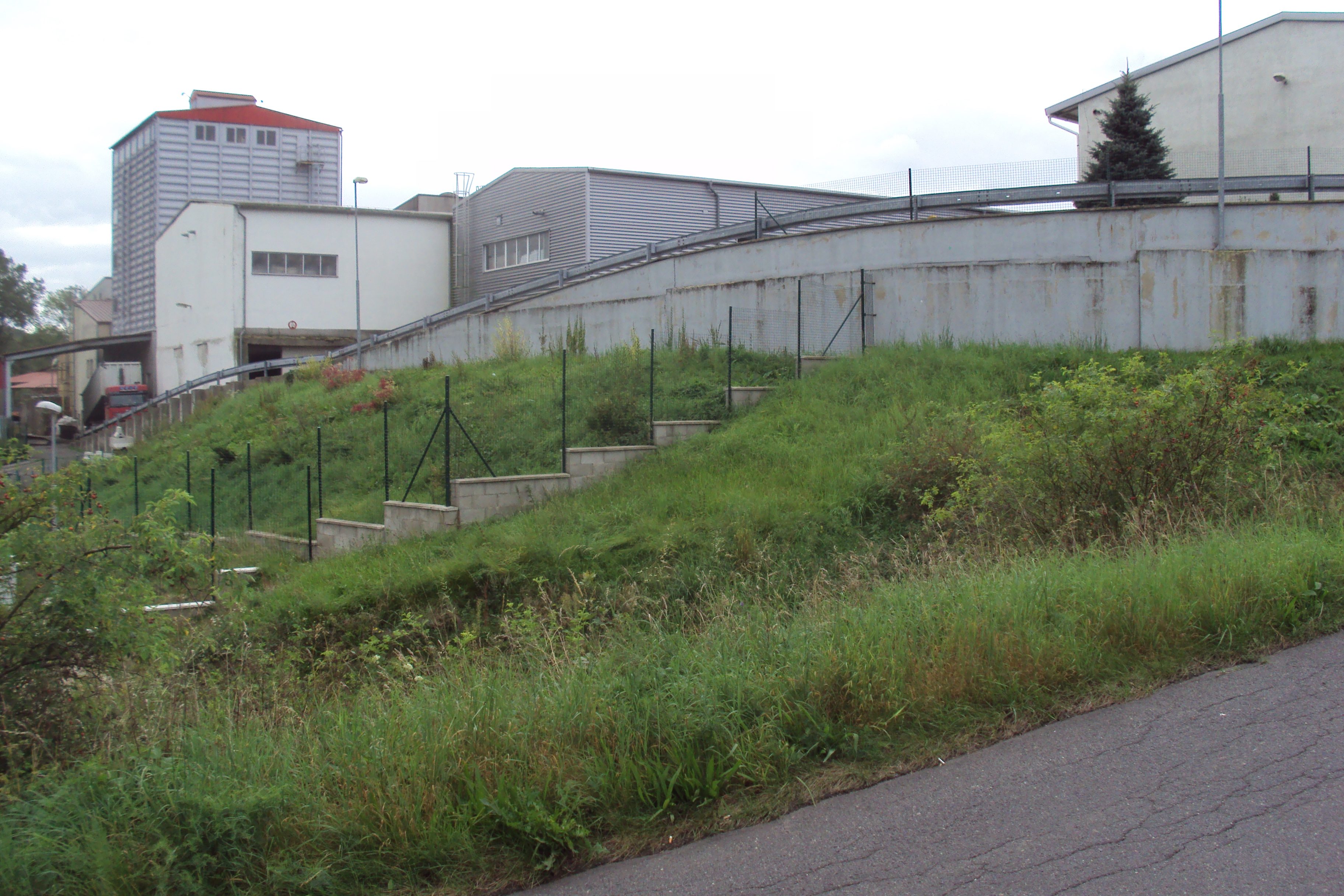 Areál výrobny krmiv fa PROVIMI asi 2 km od Brniště, samota mimo obec